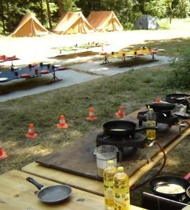 Eigen bewerking van foto van het eerste Kinderkamp 2005 van de Delftsche Zwervers in Ommen. Bron: / Auteur: Janine Bos